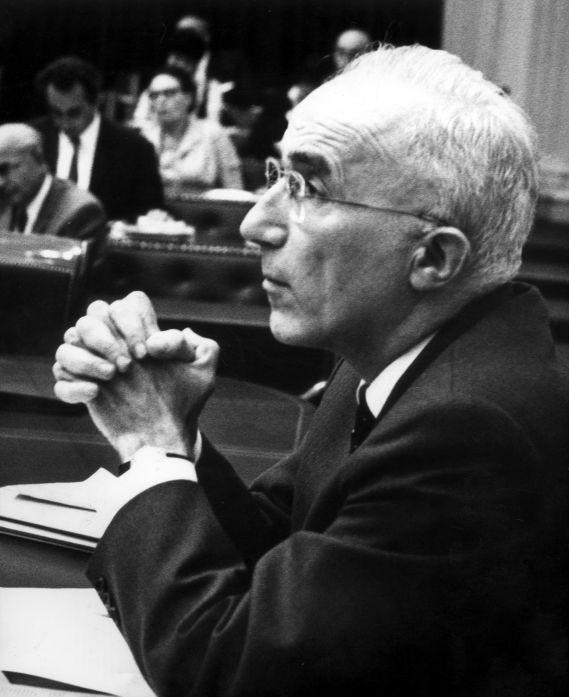 C.H.F. Polak(1909-1981), VVD-politicus, minister van justitie in de Tweede Kamer. Den Haag, 21 oktober 1969.